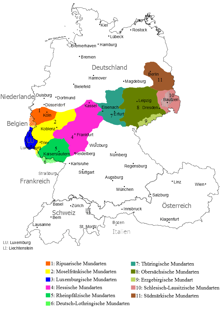 Mitteldeutsche Mundarten nach 1945 (ohne Pennsylvaniadeutsch, Siebenbürgisch-Sächsisch)